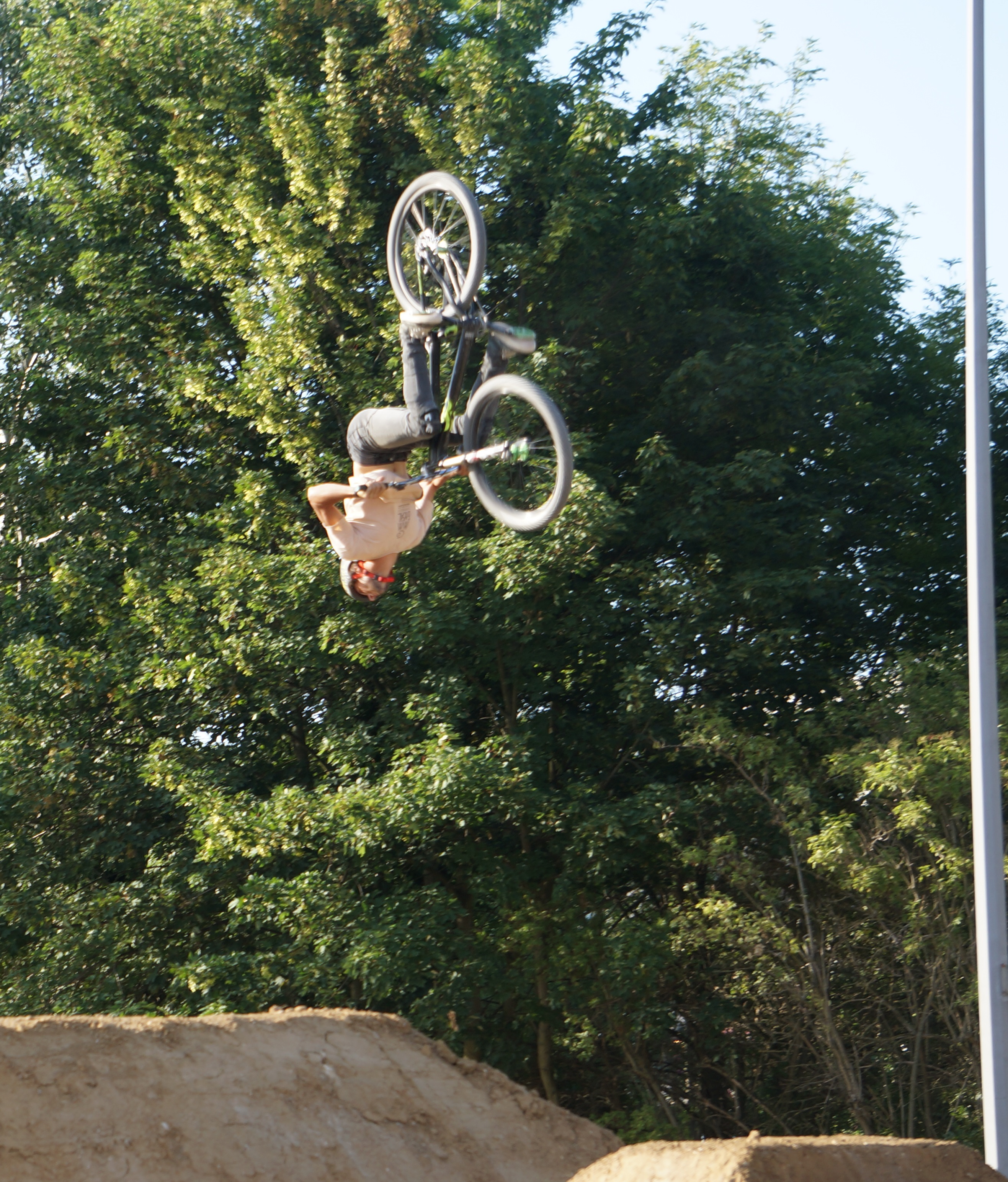 lors de FISE Xpérience Reims 2015 .